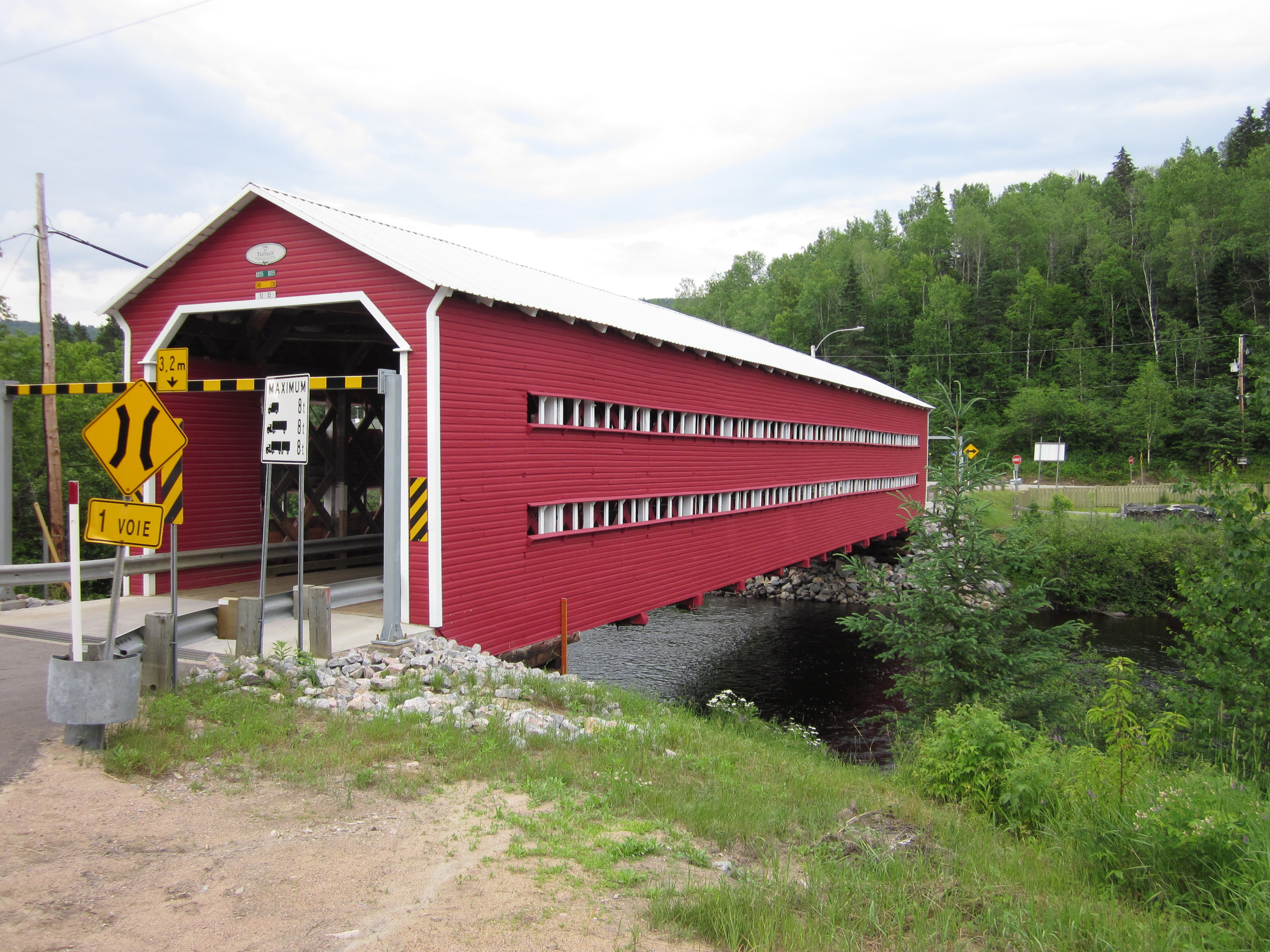 Pont Thiffault vue de l'Ouest